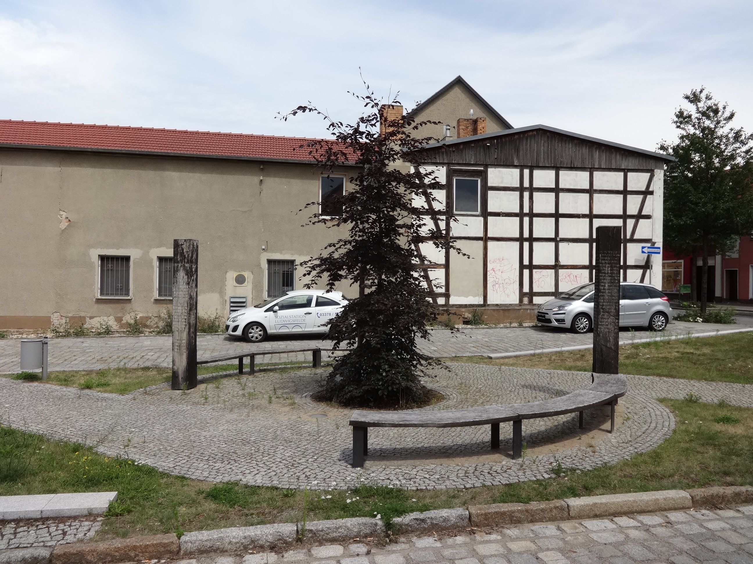 Mit dem Clauert-Rundweg ehrt die Stadt Trebbin den "märkischen Eulenspiegel" Hans Clauert, der im 16. Jahrhundert seinen Schabernack trieb. Figuren aus Bronze und Holz sowie markante Plätze sind nach ihm benannt.